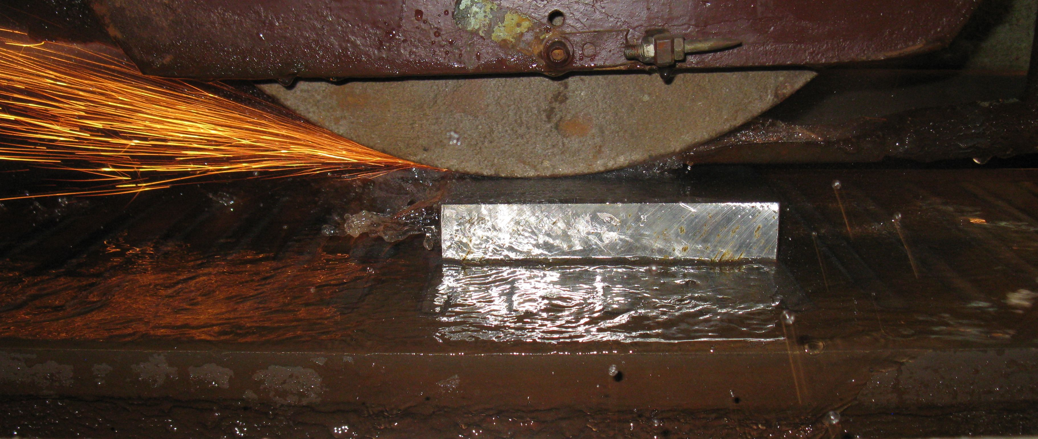 Механический процесс шлифования заготовки в метало-сборочном цехе.